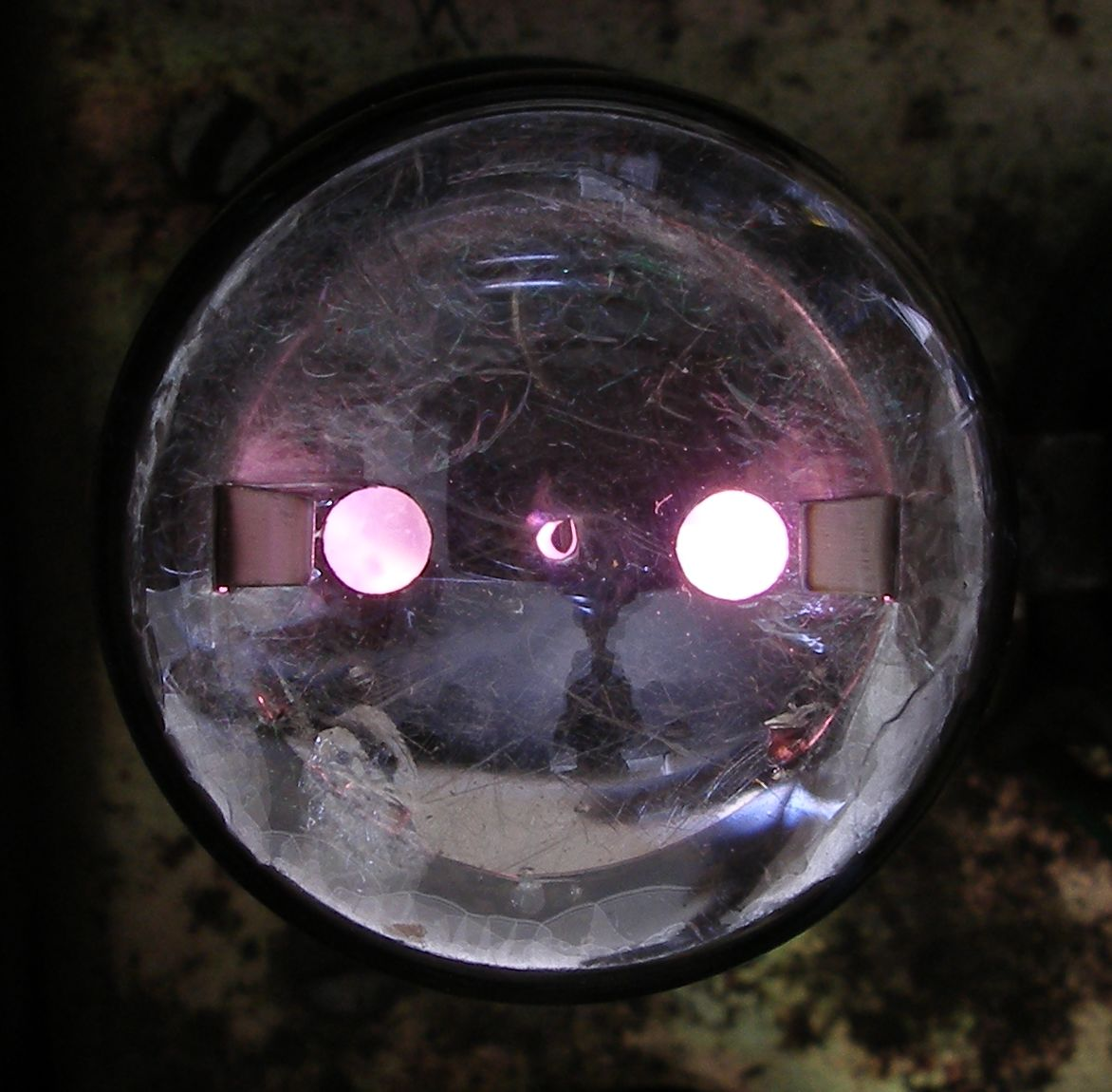 Voltage regulator tube glowing.